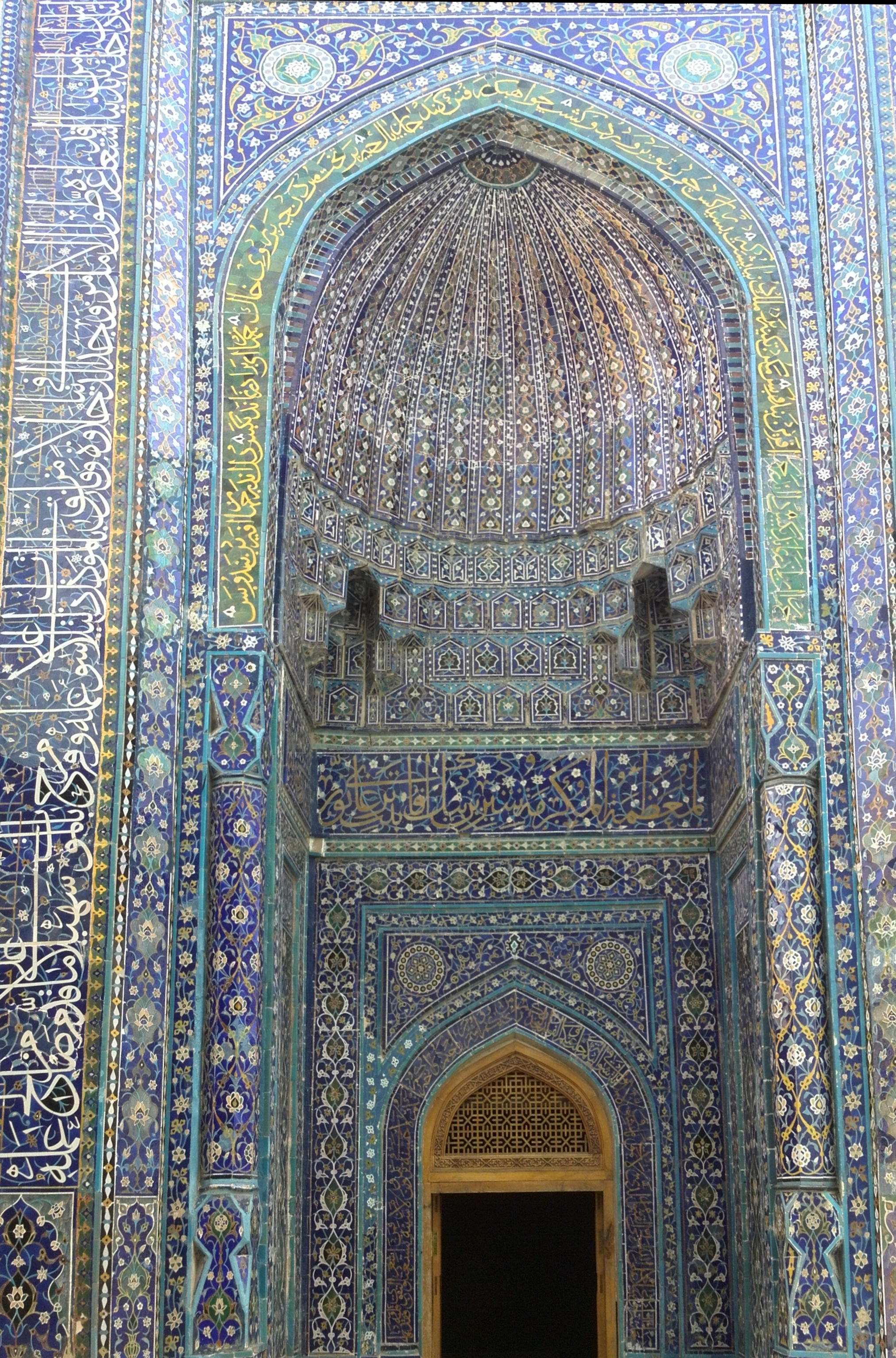 Shirinbeka Oqo Maqbarasi in Samarqand, Uzbekistan